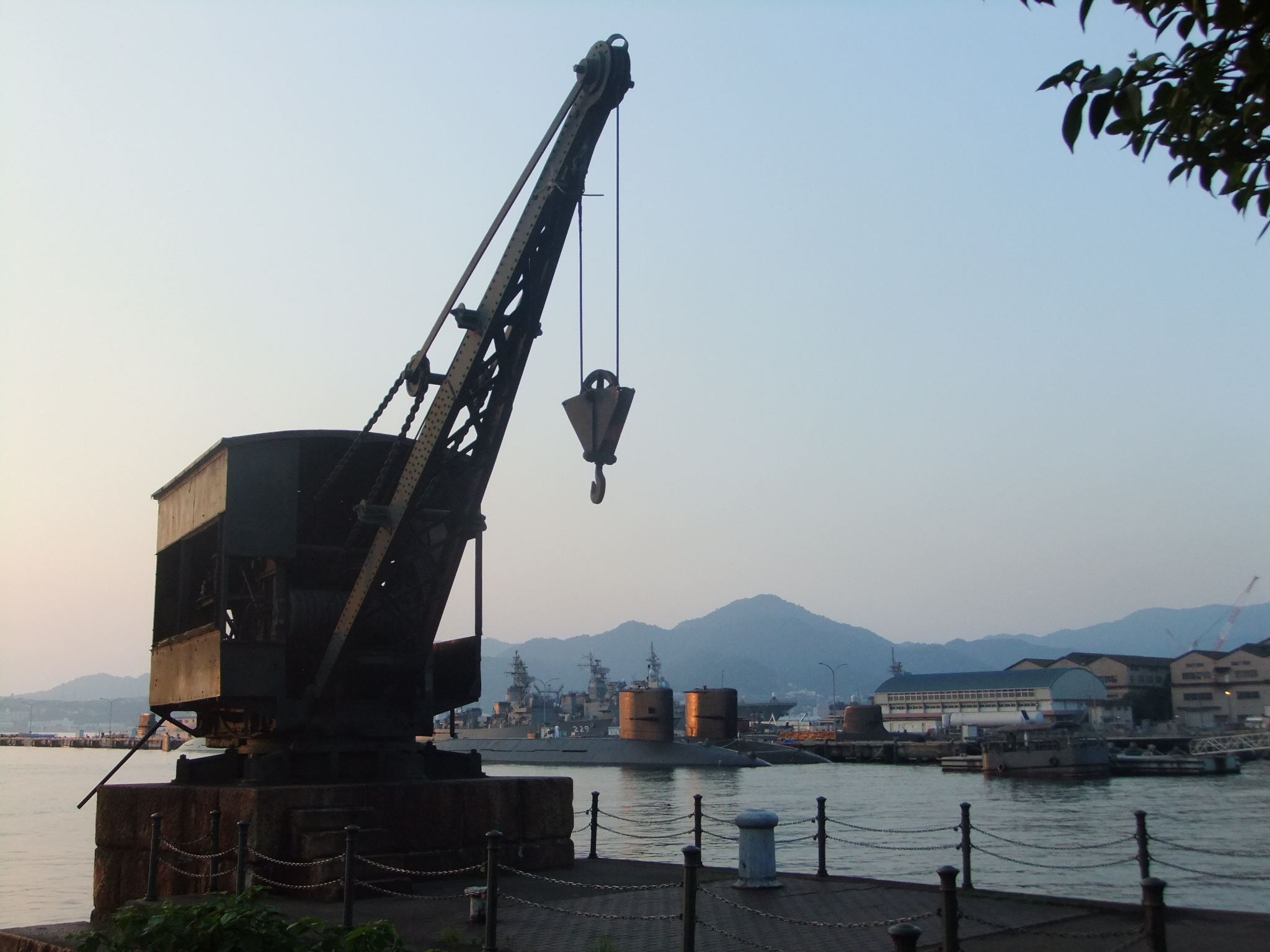 アレイからすこじまに残された魚雷積載用クレーン